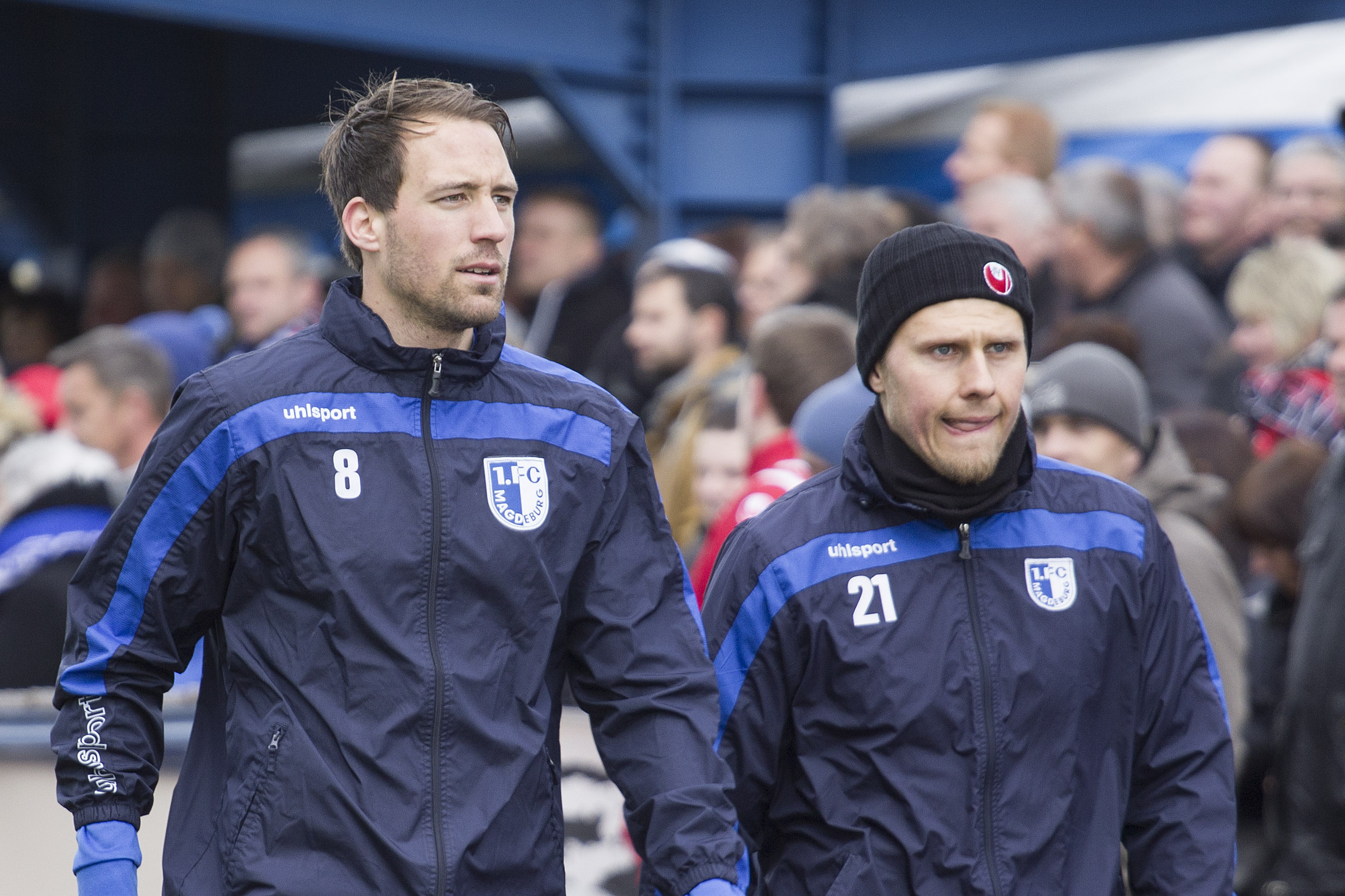 Steffen Puttkammer und Niklas Brandt